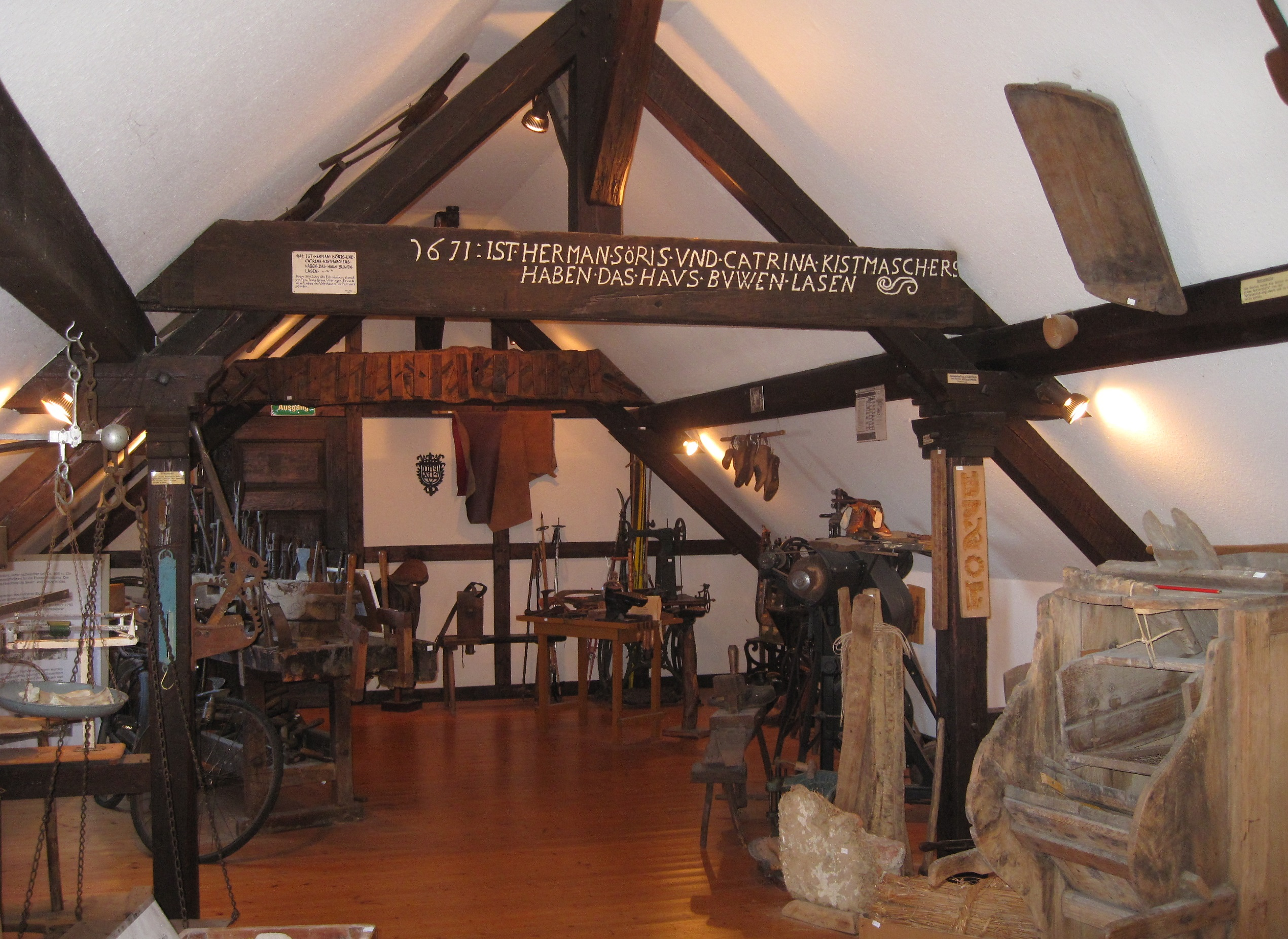 Blick in einen Raum im dritten Geschoss im Heimatmuseum (Heimatarchiv Ense - Niederense - Himmelpforten, Verein für Geschichte und Heimatpflege e. V.) in Ense-Niederense.